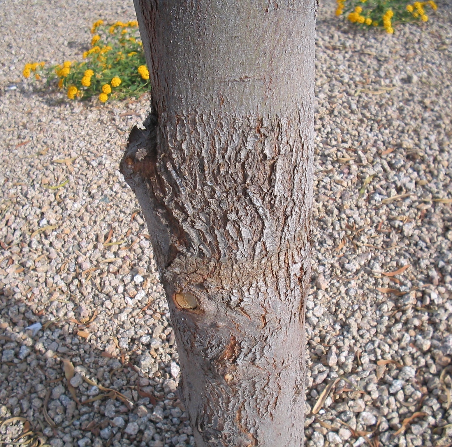 Acacia salicina Bark